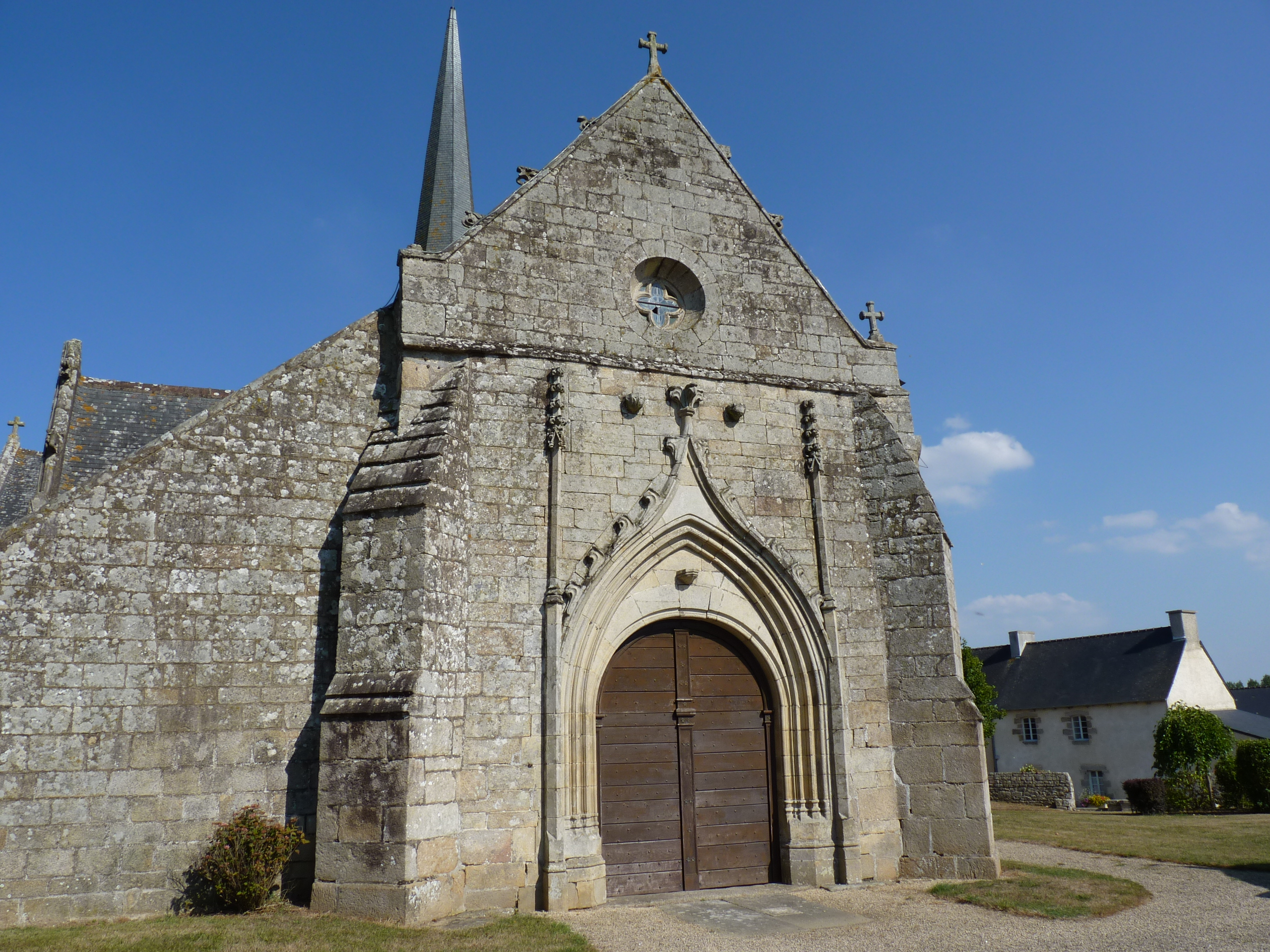 Église (14ème - 16ème siècles)